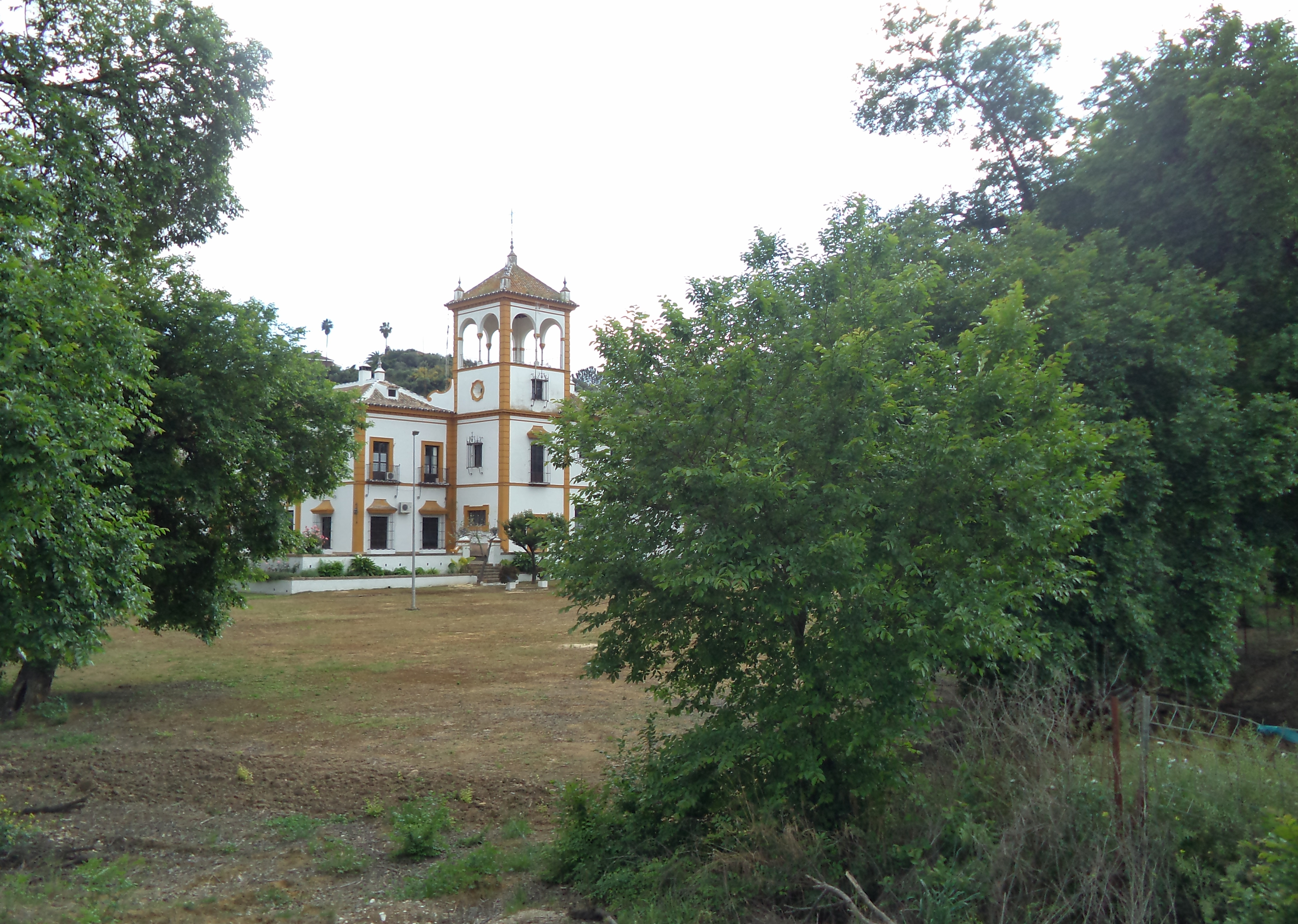 Hacienda Simón Verde